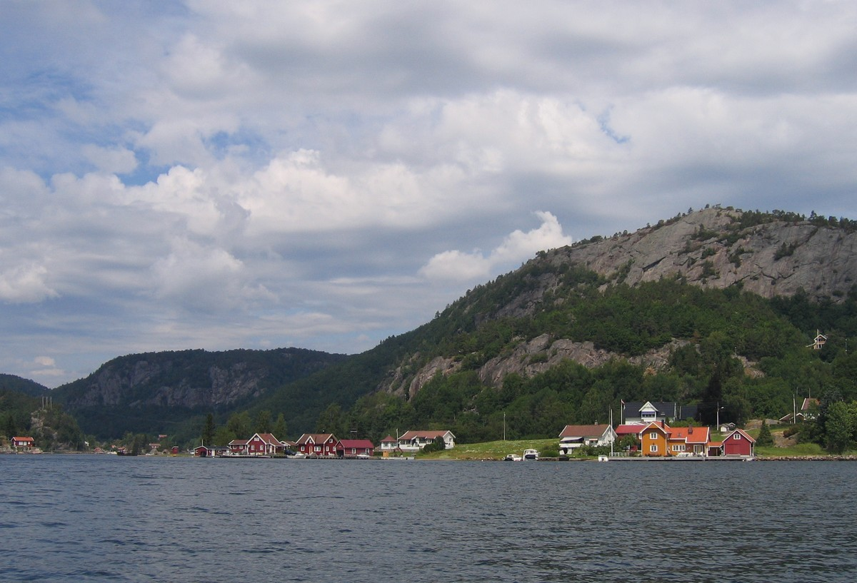 Garden Holmen ved Trysfjorden i Søgne, Ves-Agder